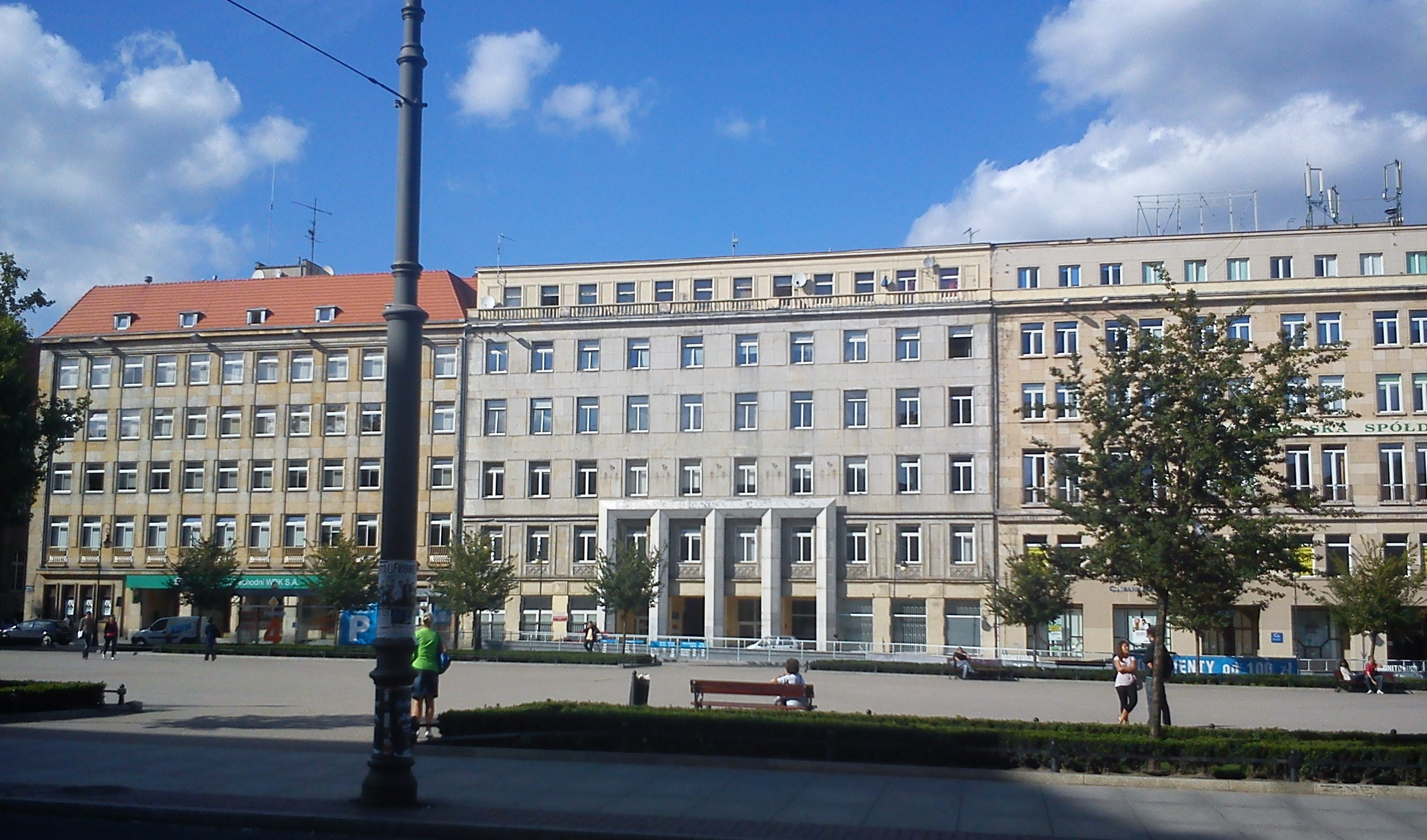 Poznan, Pleace Wolnosci, Nord Site